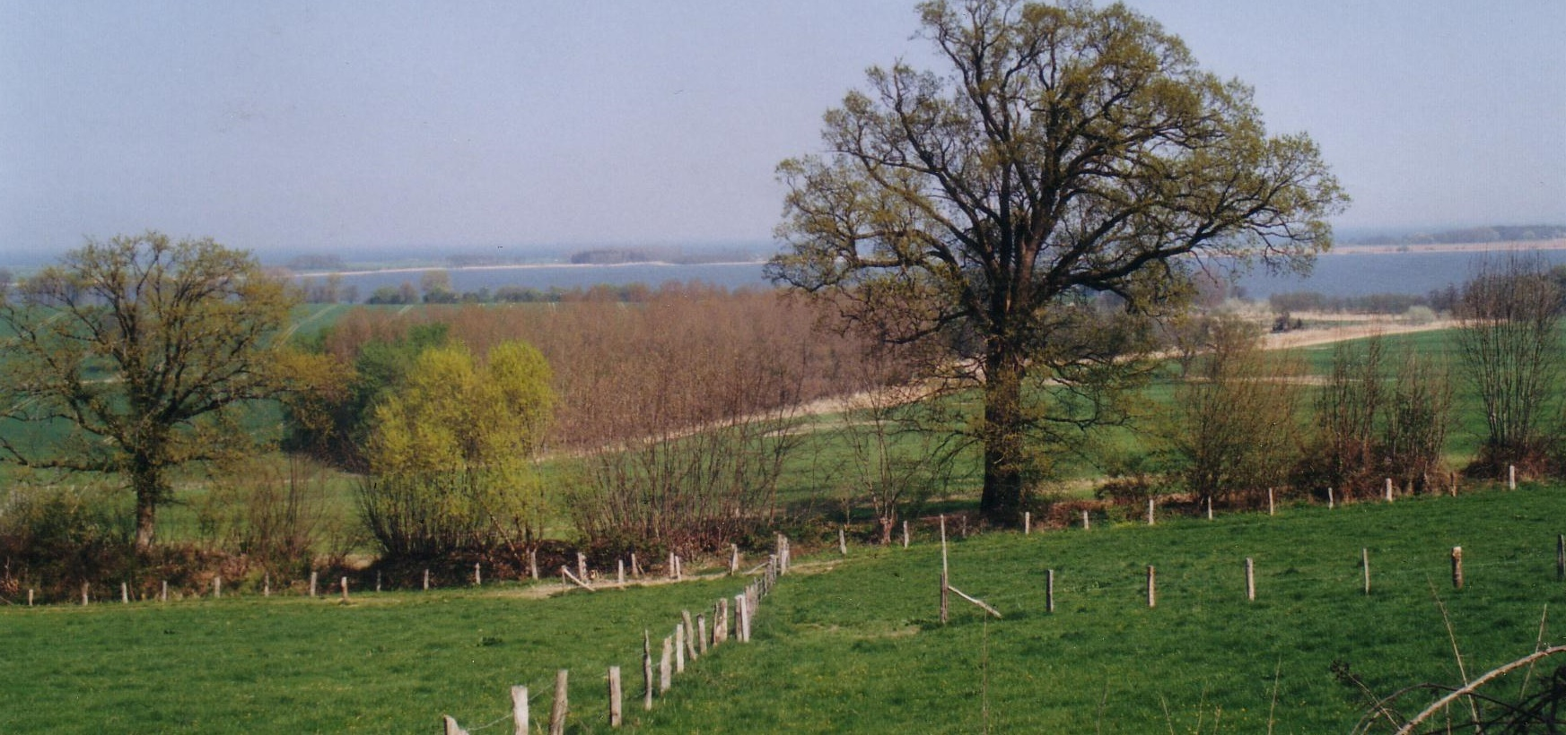 Blick vom Mühlenberg auf den Großen Binnensee bei Waterneversdorf, Landkreis Ostholstein, Schleswig-Holstein